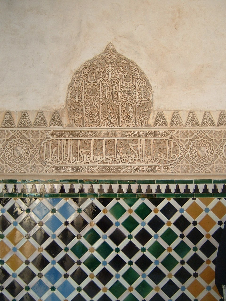 Alhambra, decorazioni